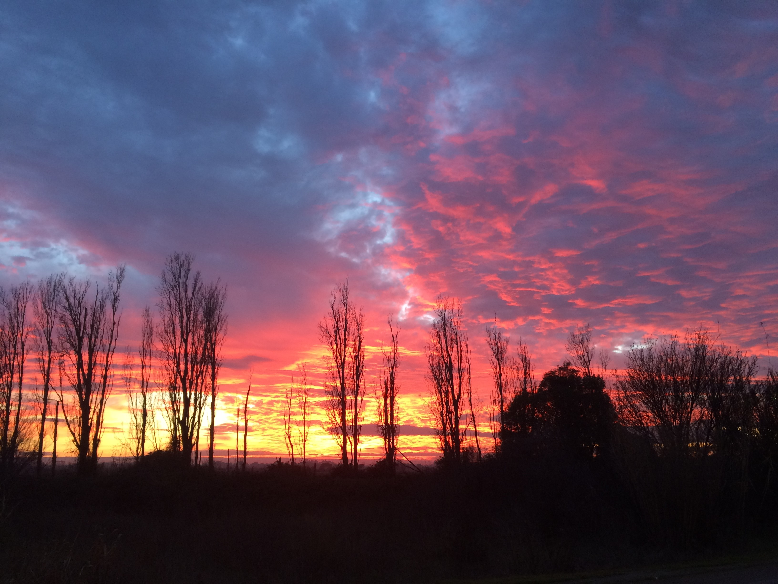 Atardecer en El Caracol